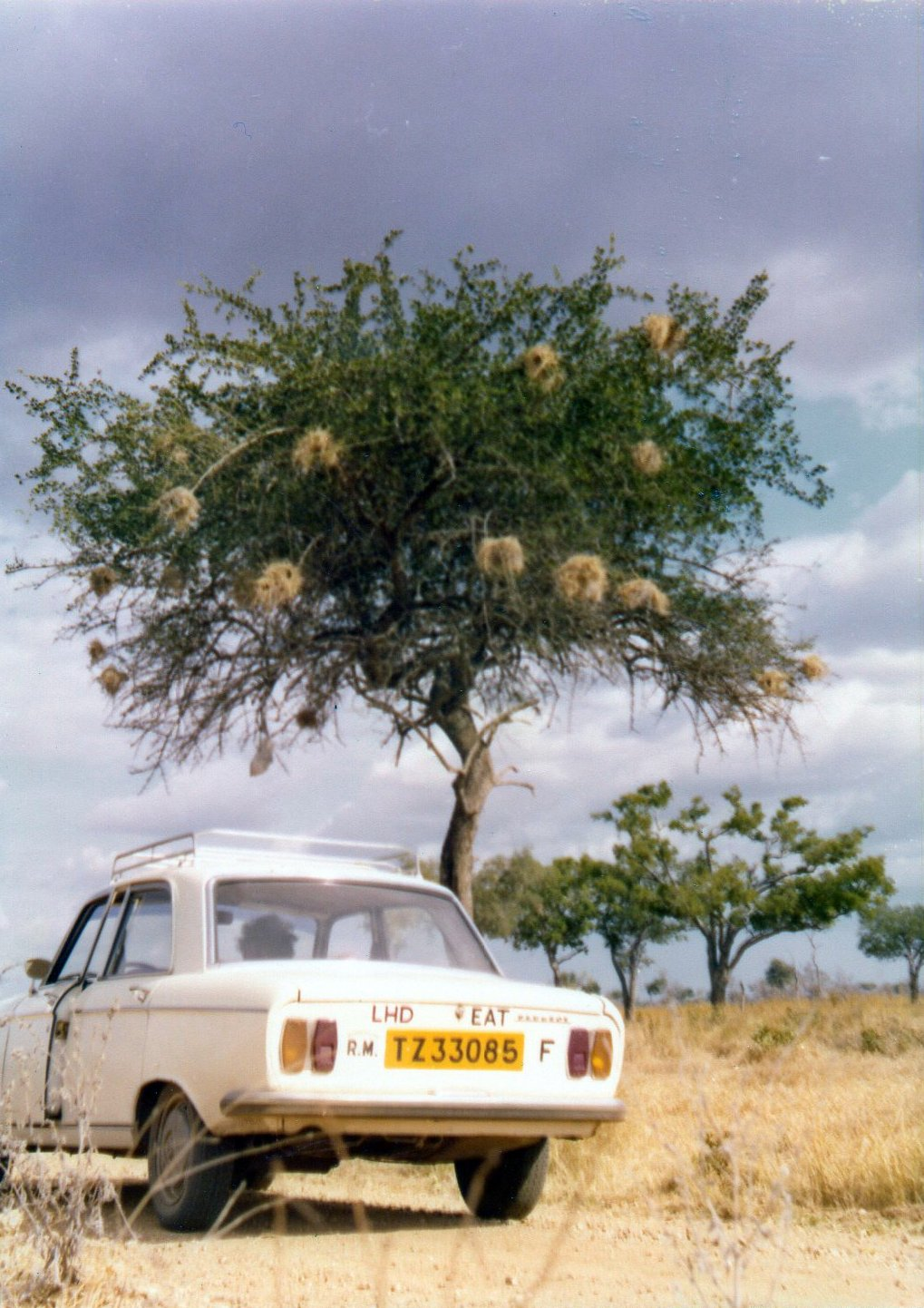 Mikumi National Park, Tanzania